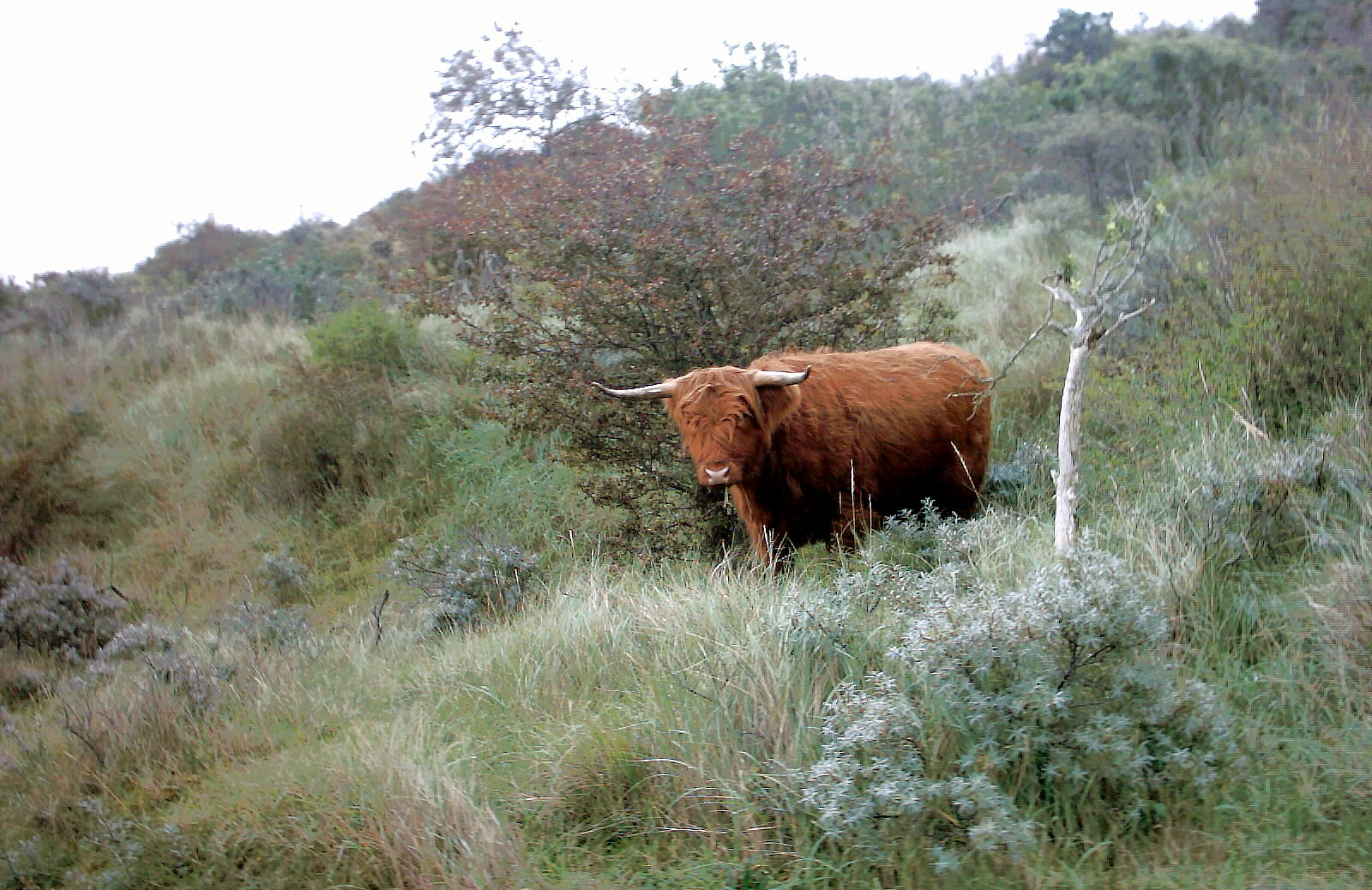 Schotse hooglander in Nationaal Park Zuid Kennemerland